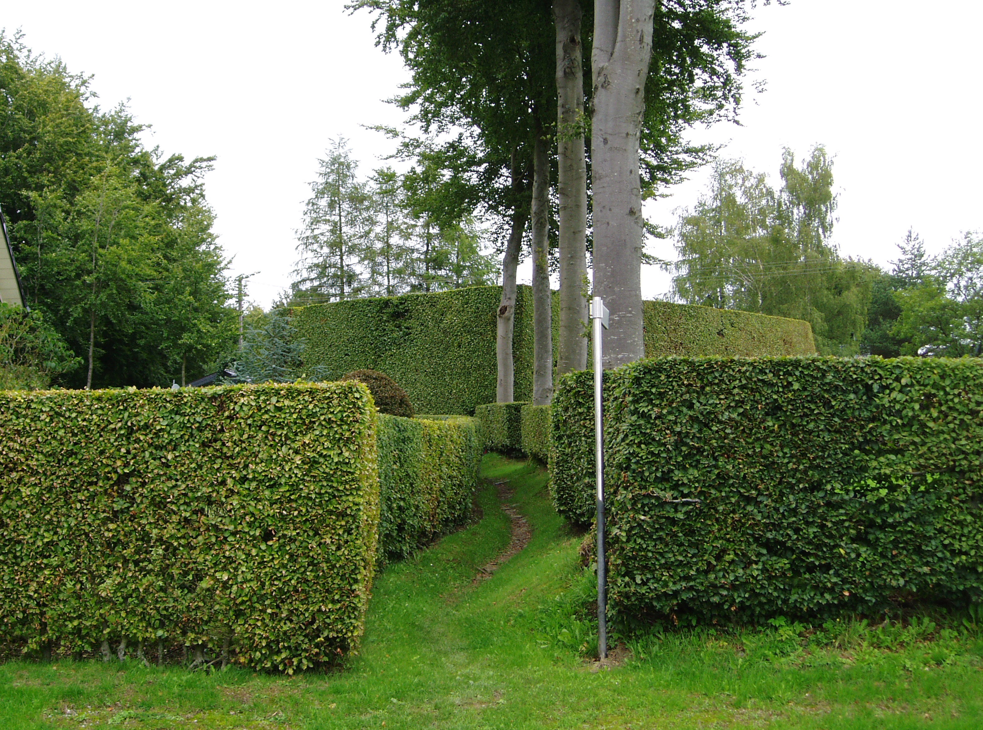 Heckenweg in der Monschauer Heckenlandschaft in der Eifel